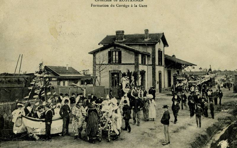 Formation d'un cortège en gare de Rostrenen